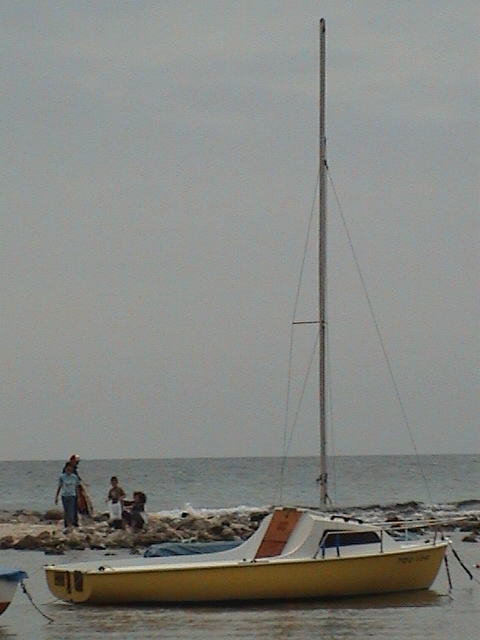 Velero Garibal 16 pies de astilleros Liberti fondeado en una playa de la costa española del Mediterráneo